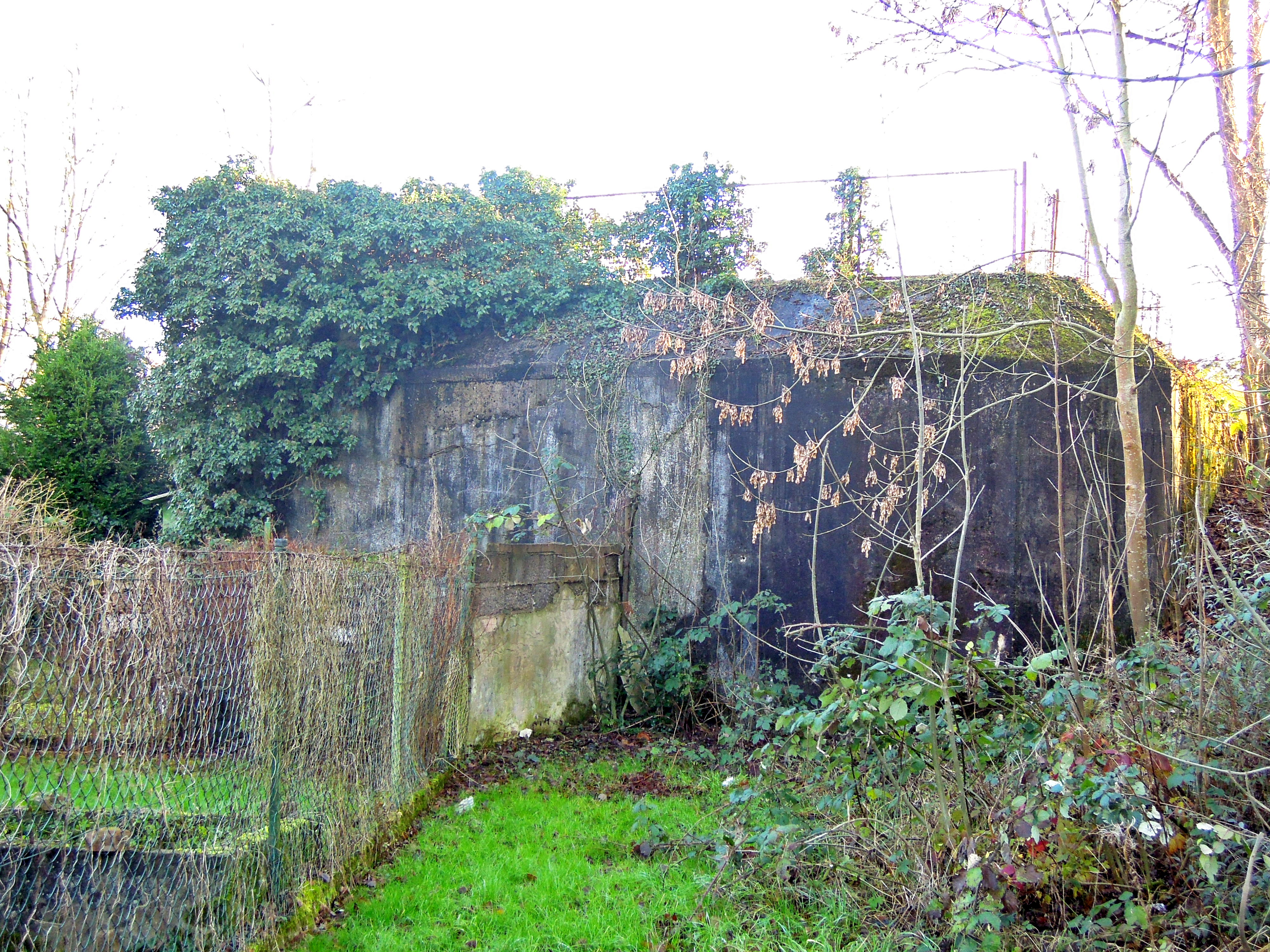 Westwallbunker WH74 in Dillingen/Diefflen an der Ecke Umgehungsstraße, Mandelbachweg